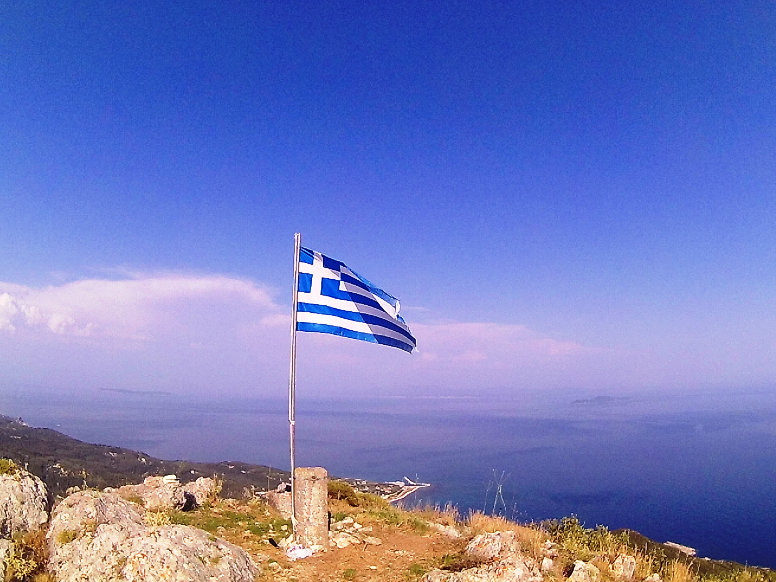 Οθωνοί